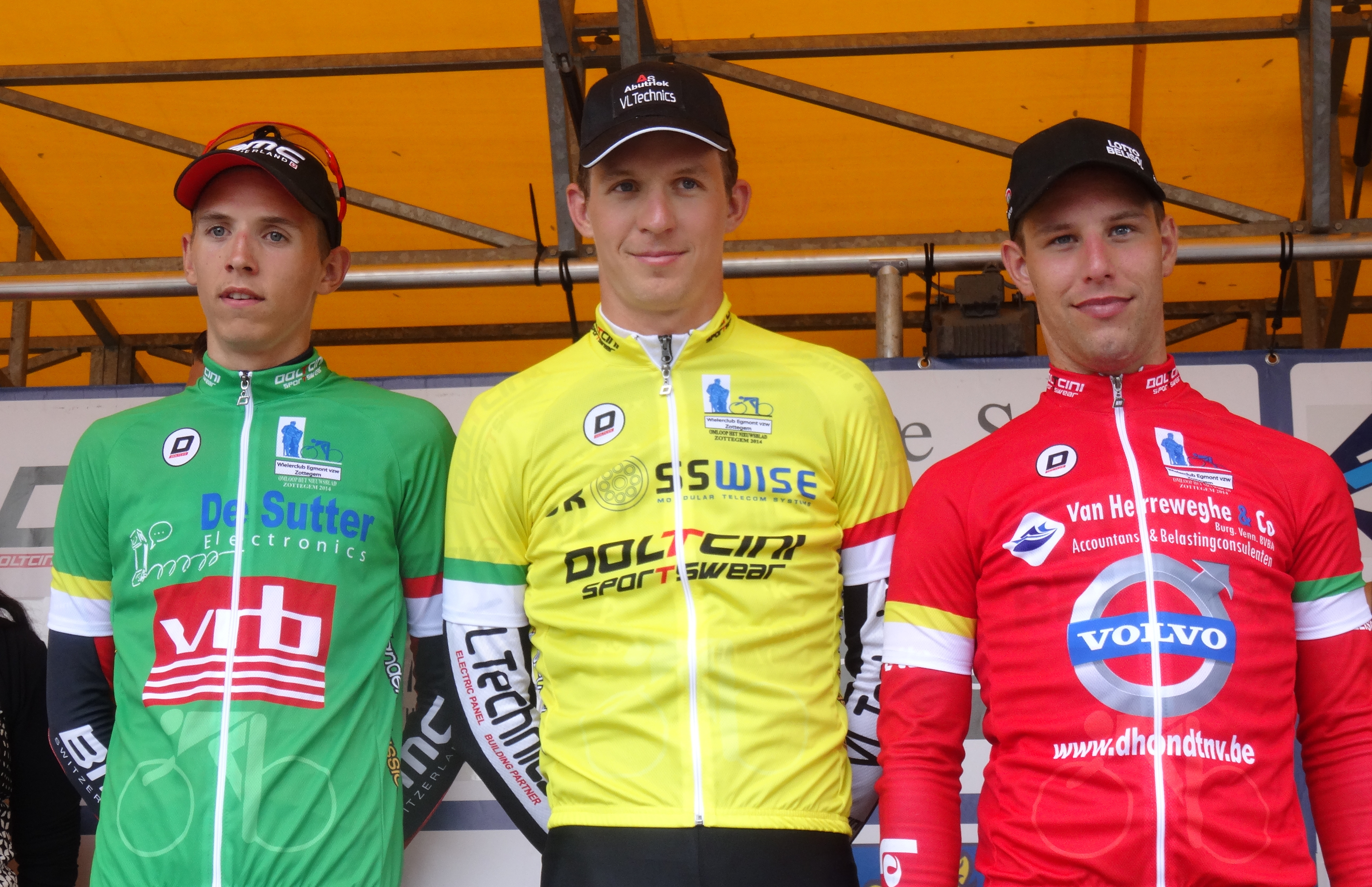 Reportage photographique réalisé le samedi 5 juillet à l'occasion du départ et de l'arrivée du Circuit Het Nieuwsblad espoirs 2014 à Grotenberge (Zottegem), Belgique.